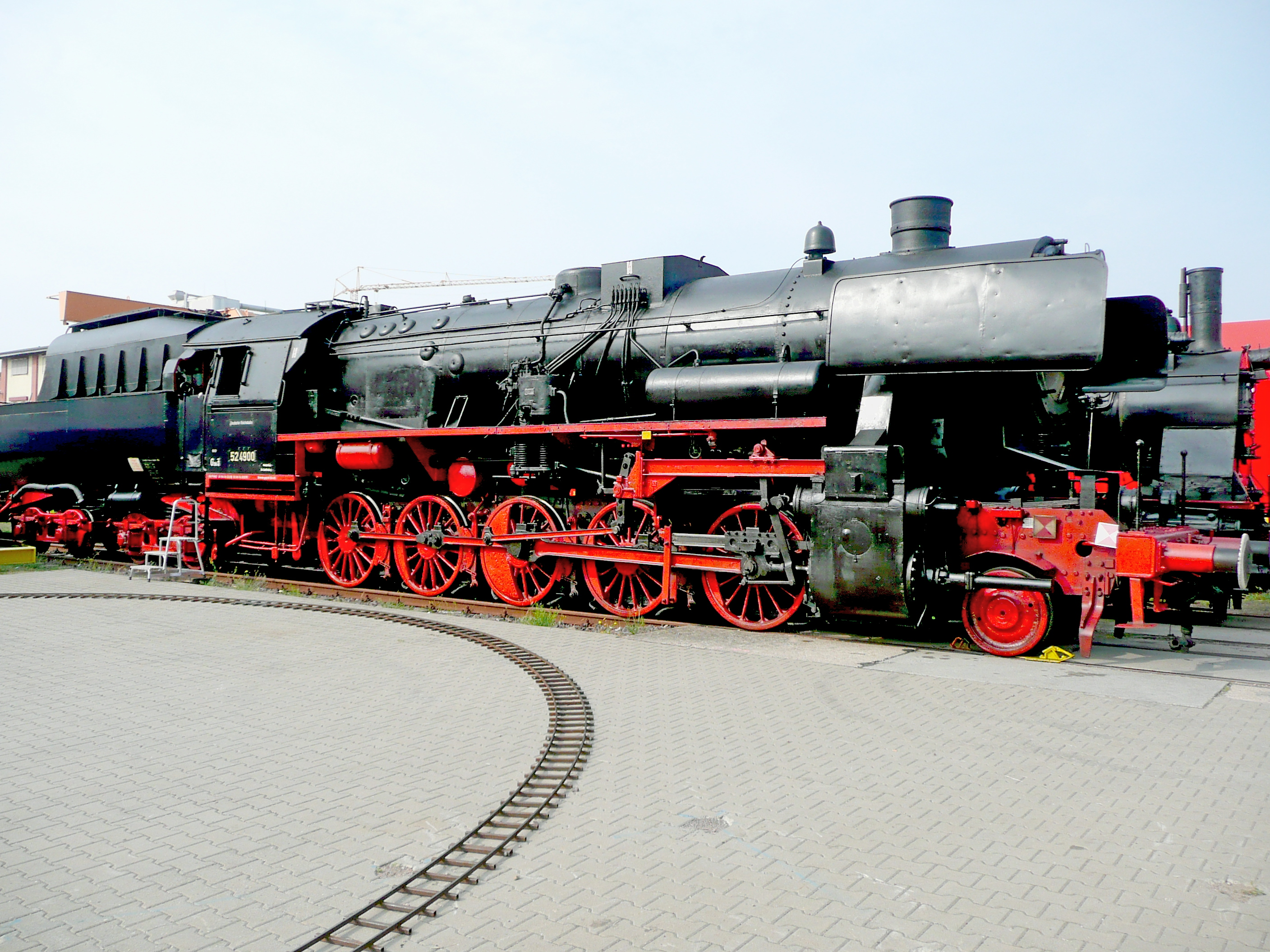 52 4900 beim Elloktreffen im DB Museum Halle